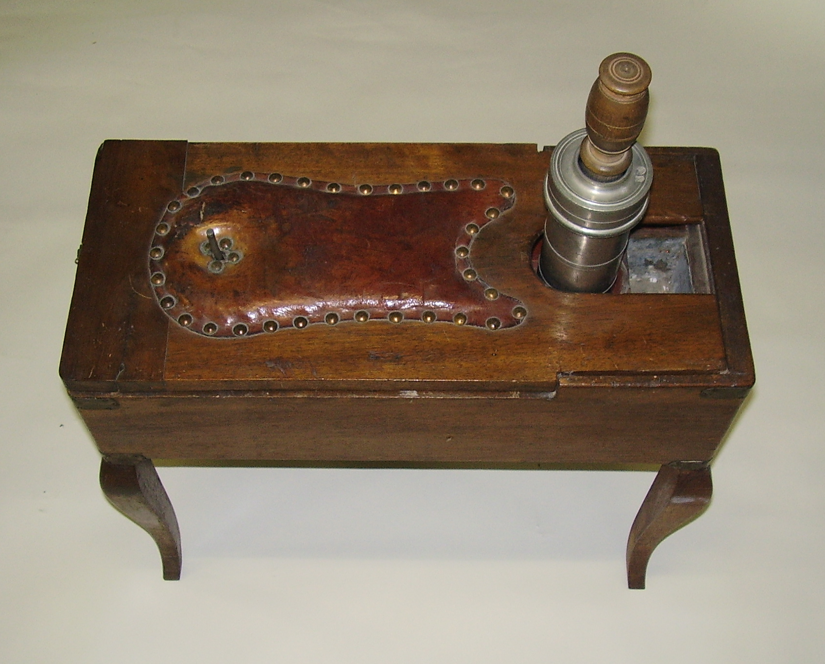 Abbildung: Transportabler Selbstklistier-Apparat nach Giovanni Alessandro Brambilla aus dem 18. Jahrhundert. Man setzt sich mit dem After auf das Röhrchen und spritzt sich den Inhalt der Zinnspritze ein. Medizinhistorisches Museum der Universität Zürich.